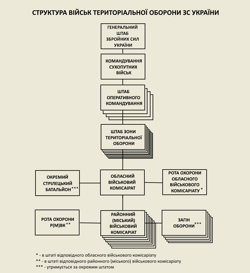 Схема, Структура територіальної оборони України